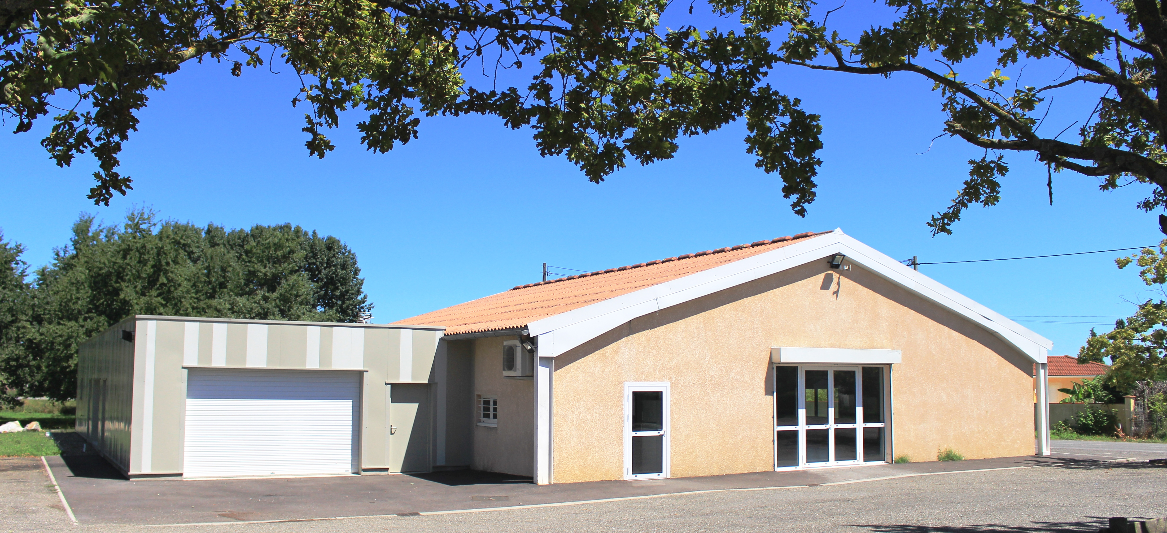 Salle des fêtes de Mascaras (Hautes-Pyrénées)